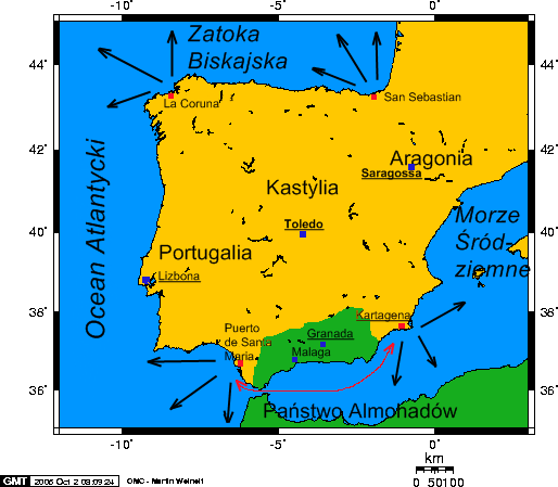 Mapa z lokalizację portów Zakonu NMP z Hiszpanii oraz kierunkiem działania flotylli zakonnych Autor: Janmad Licencja: GFDL